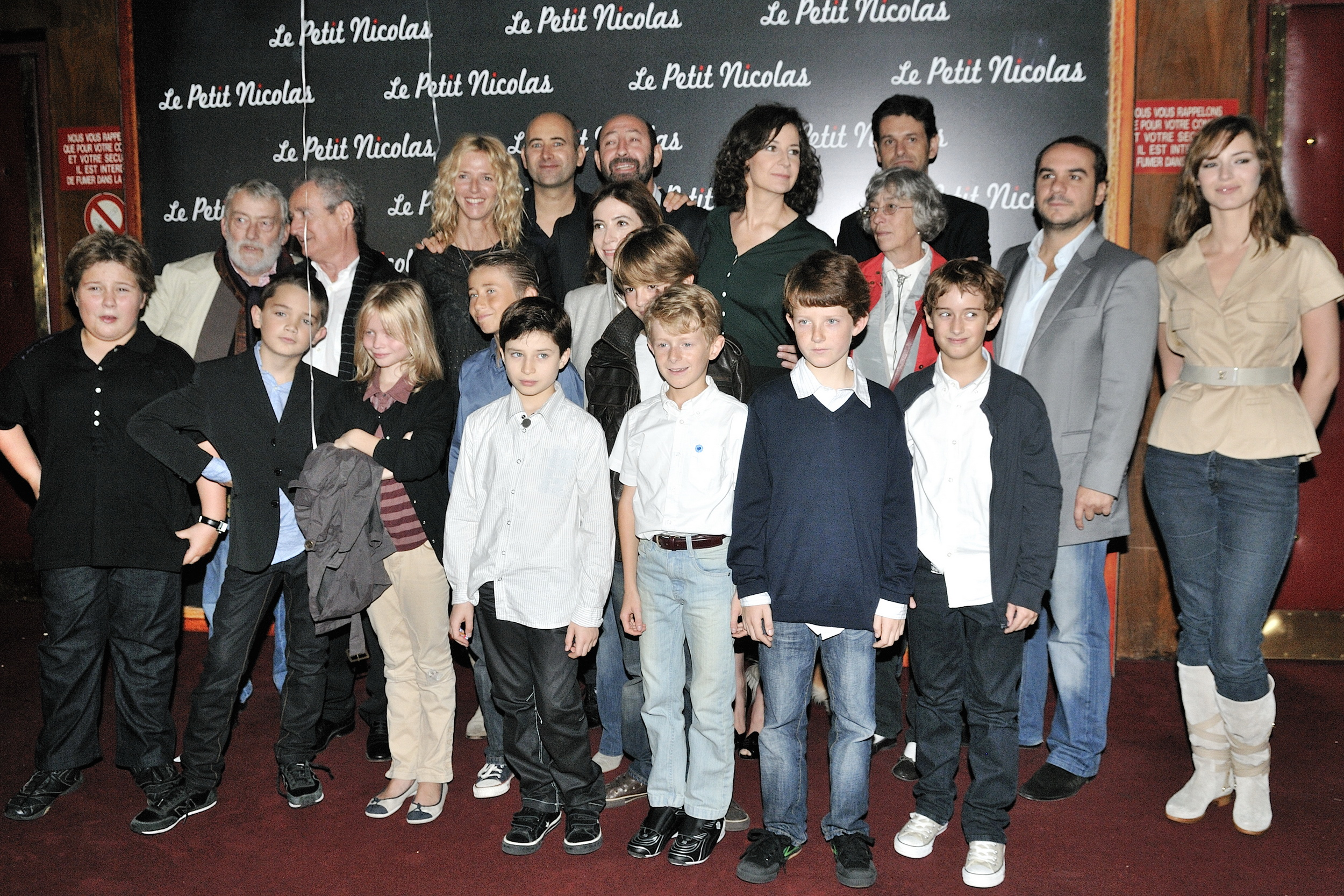 Avant-première du film Le Petit Nicolas au Grand Rex, à Paris, le 20 Septembre 2009, en présence de toute l'équipe de film : Valérie Lemercier, Kad Merad, Sandrine Kiberlain, François-Xavier Demaison, Michel Duchaussoy, Daniel Prévost, Anémone, François Damiens, Louise Bourgoin, Laurent Tirard, Maxime Godart et d'autres enfants du film.